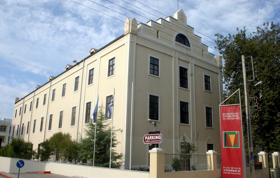 Template:Μονή Λαζαριστών